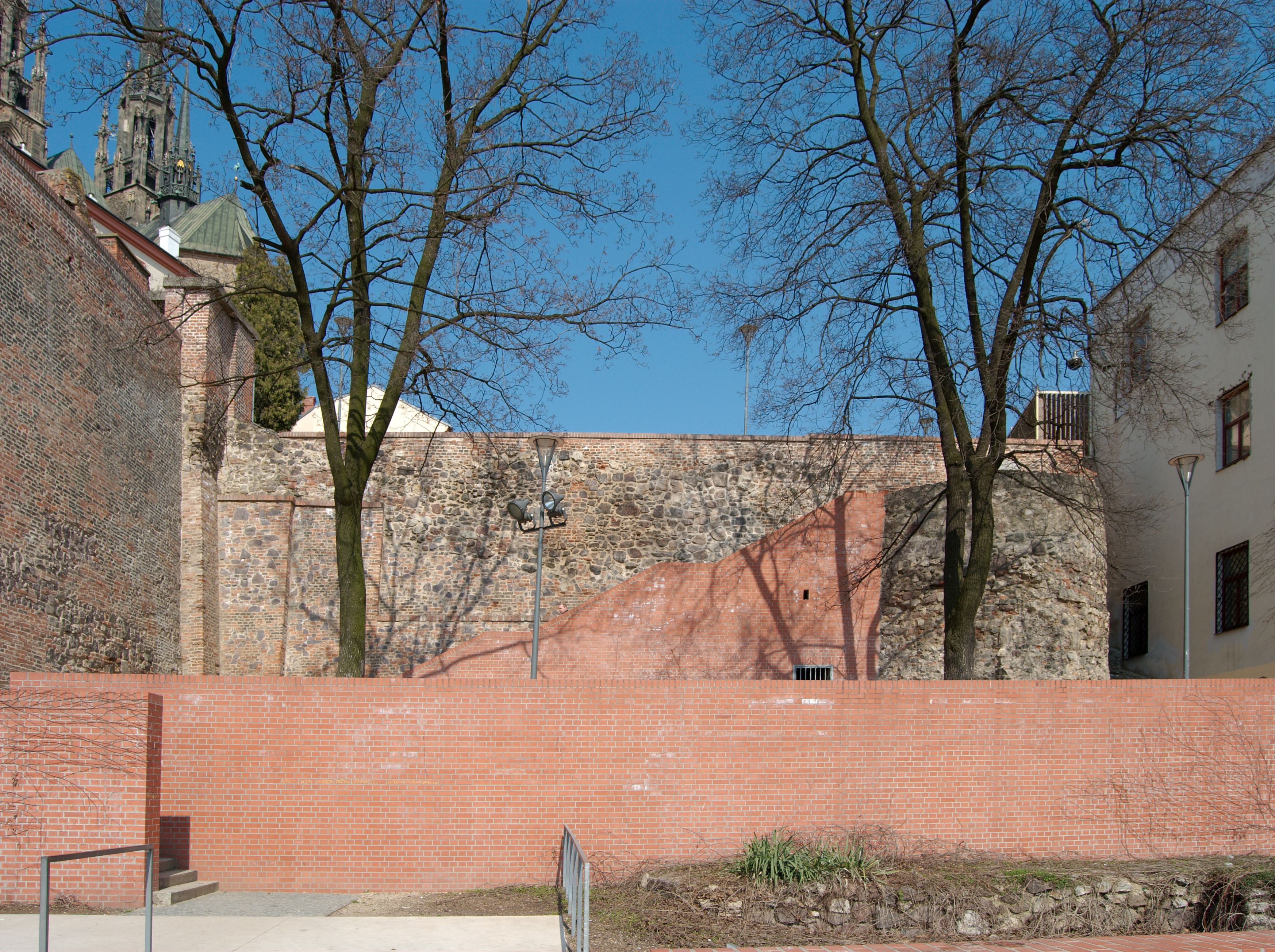 Dochovaný úsek středověkých brněnských hradeb přiléhající k ulici Bašty